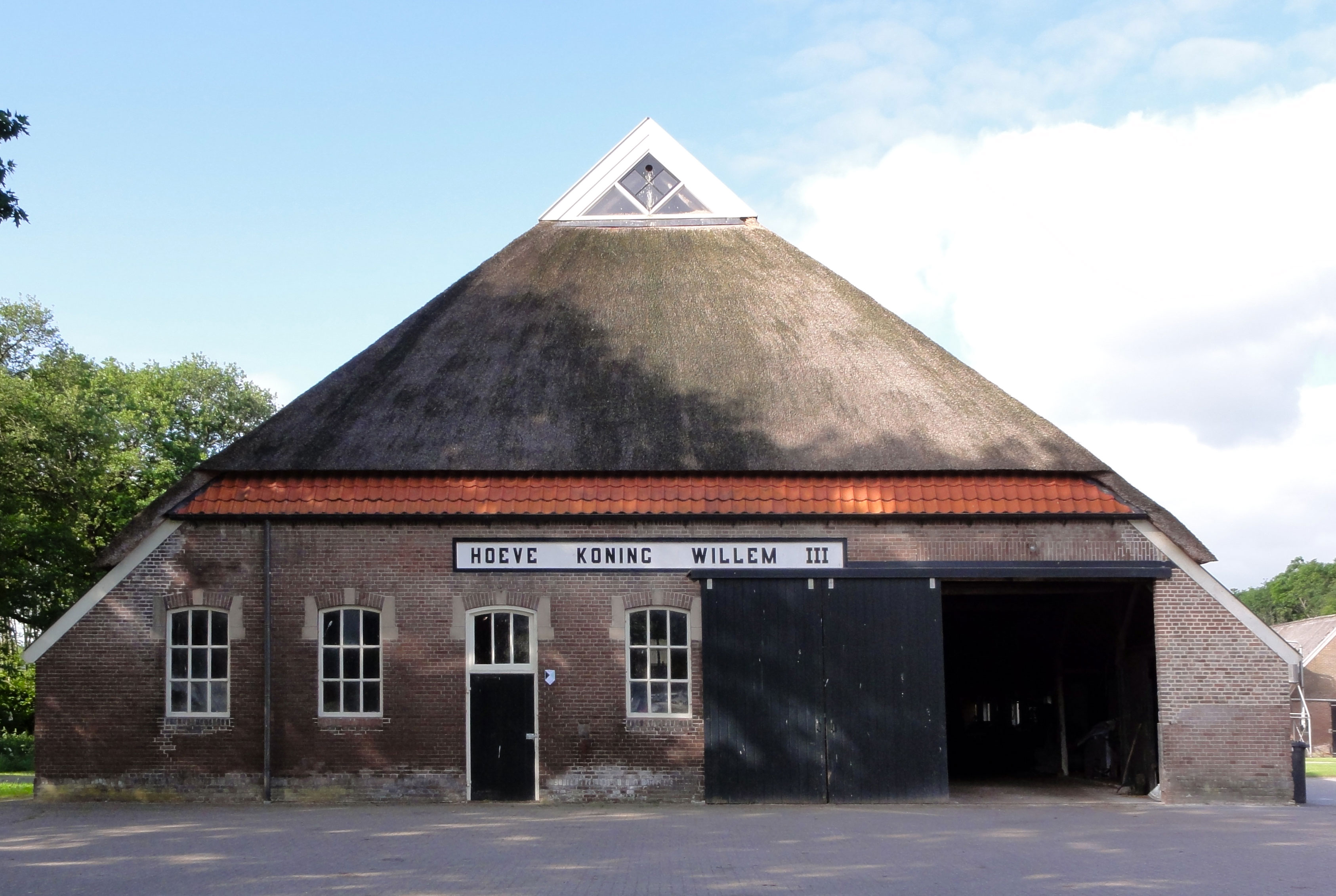 Hoeve Koning Willem III - Maatschappij van Weldadigheid - Koningin Wilhelminalaan 66 Frederiksoord - rijksmonument